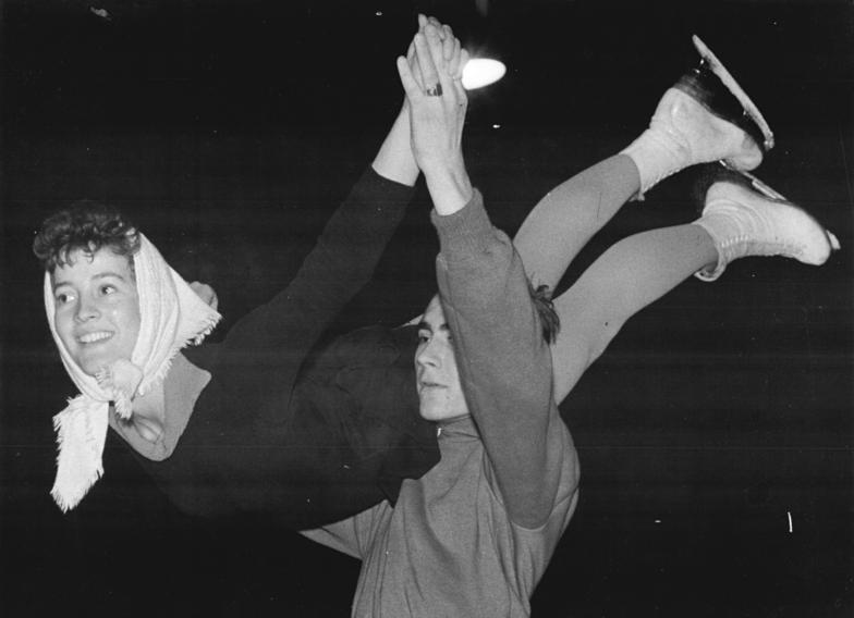 Irene Müller, Hans-Georg Dallmer Zentralbild Kohls 21.12.1960 Einen "bunten Weihnachtsteller" präsentieren die Polarsterne des SC Dynamo Berlin am 26. Dezember 1960 den Berlinern. Im Eisstadion des Dynamo-Sportforums wird deshalb eifrig trainiert. UBz: Irene Müller und Hans-Georg Dallmer.